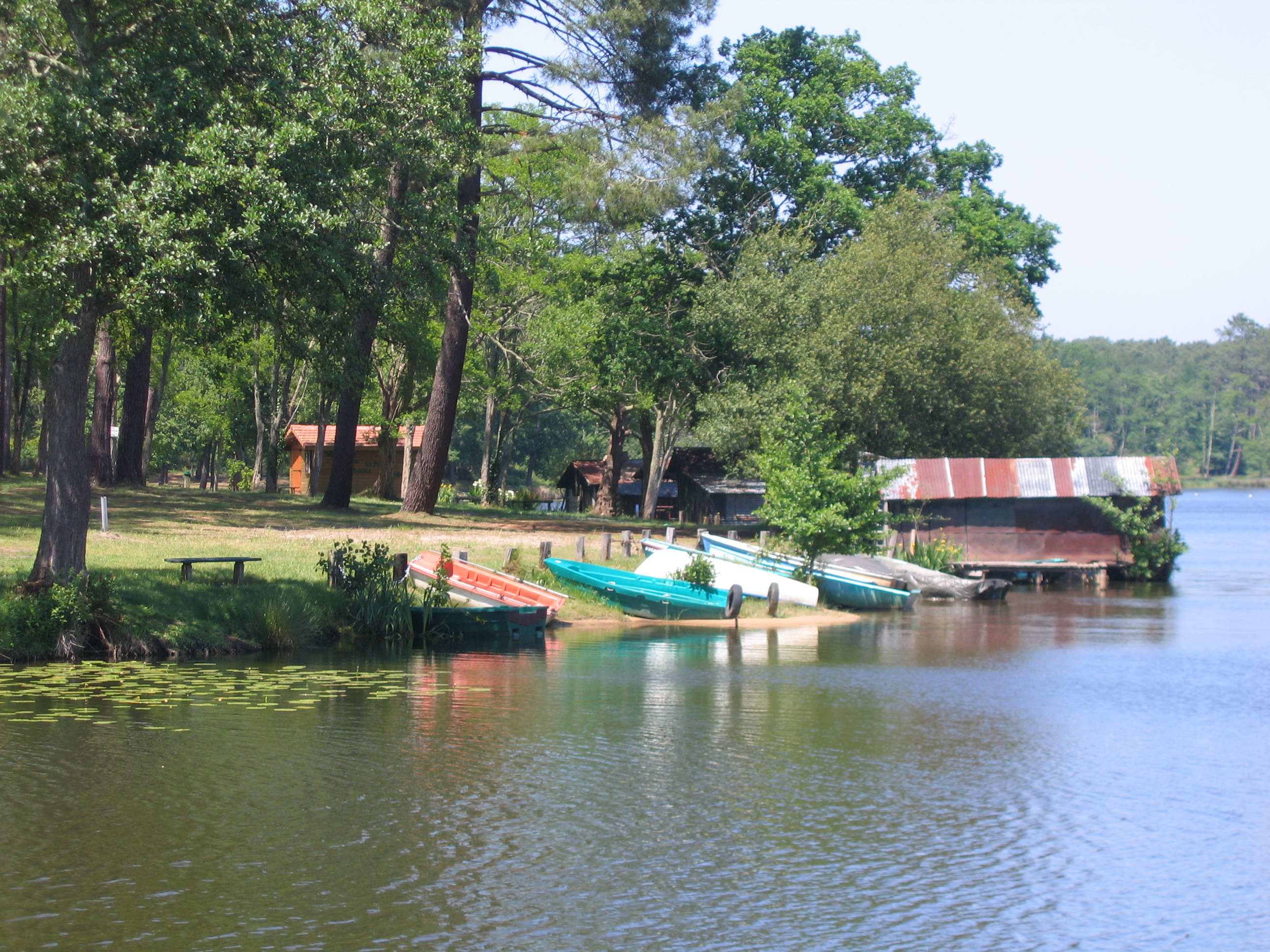 Étang d'Aureilhan dans les Landes (département) Aquitaine